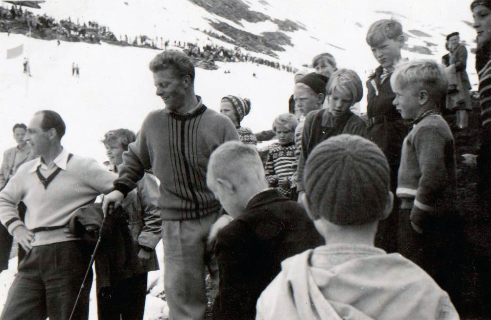 Stein Eriksen på Trollstigen trolig i 1953